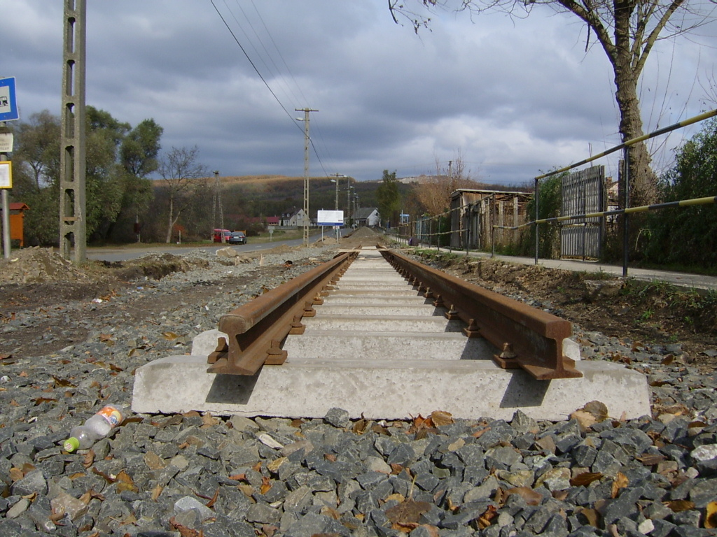 Épülő kisvasúti pálya a szobi vonalon